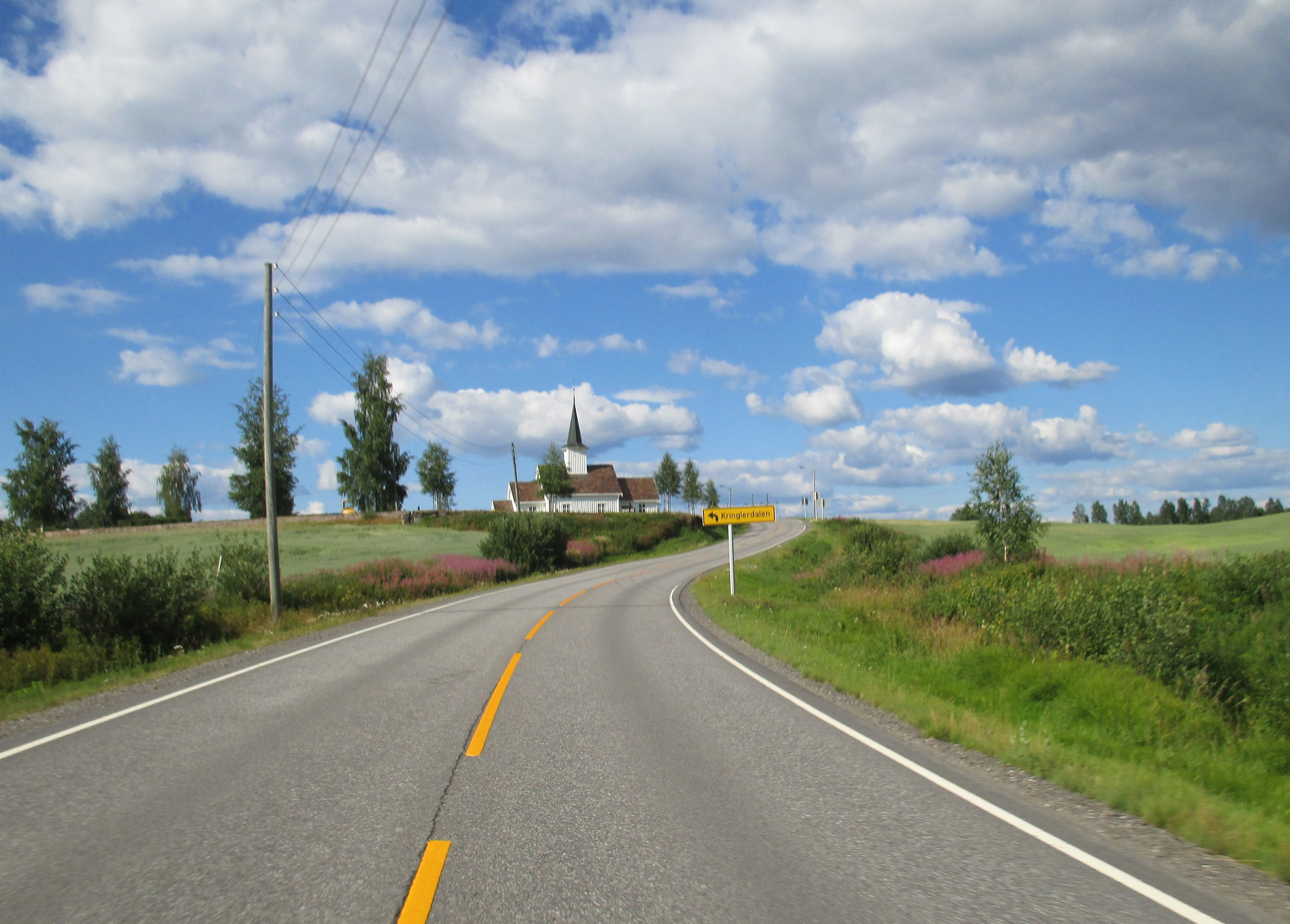 Primær fylkesvei 120 ved Bjørke kirke sør for Maura i Nannestad